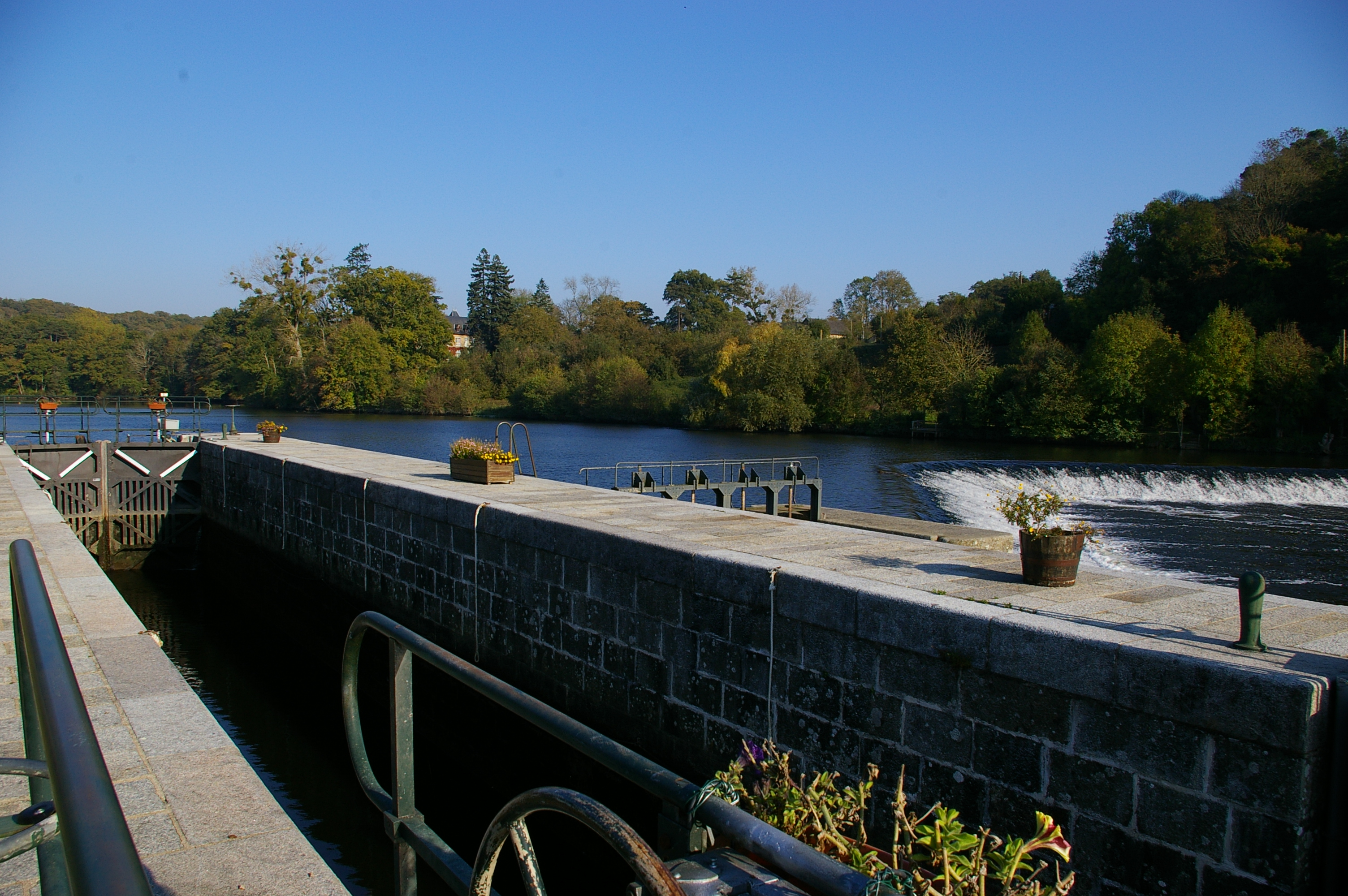 La Mayenne près d'Origné